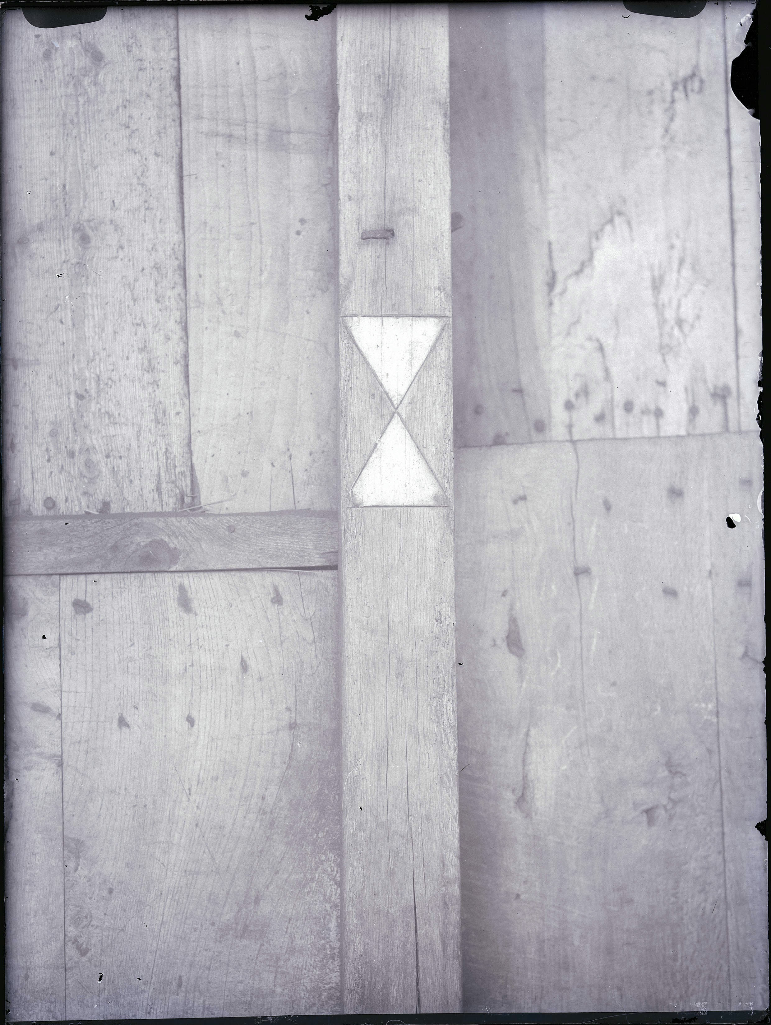 Erve Booijnk: stiepelteken (opmerking: Klaas Uilkema onderzocht deze boerderij op 26 augustus 1922)